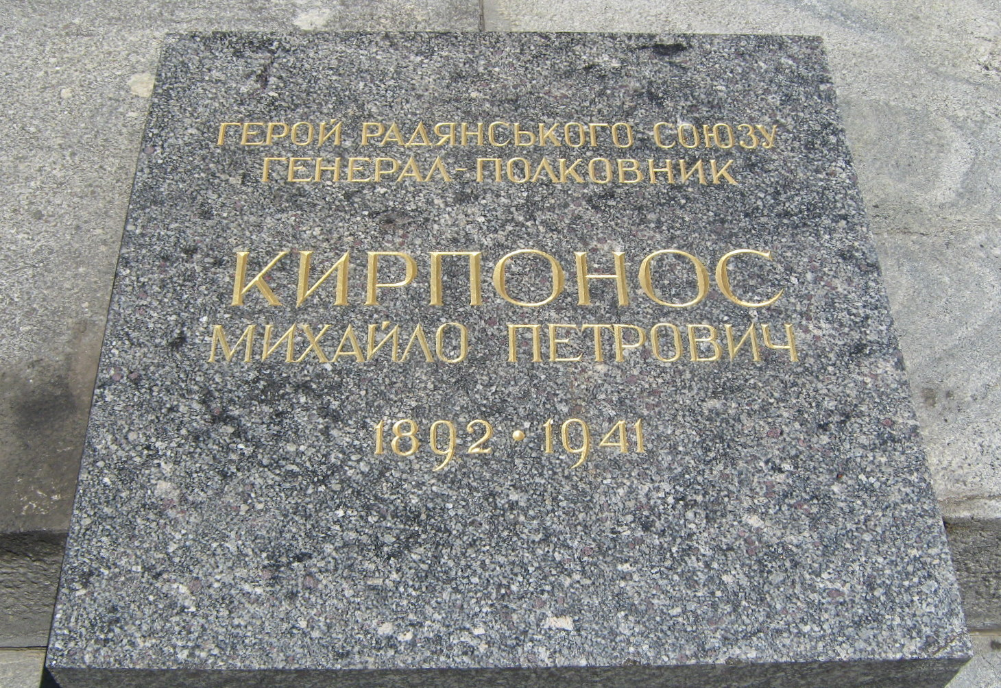 Меморіал Вічної Слави.